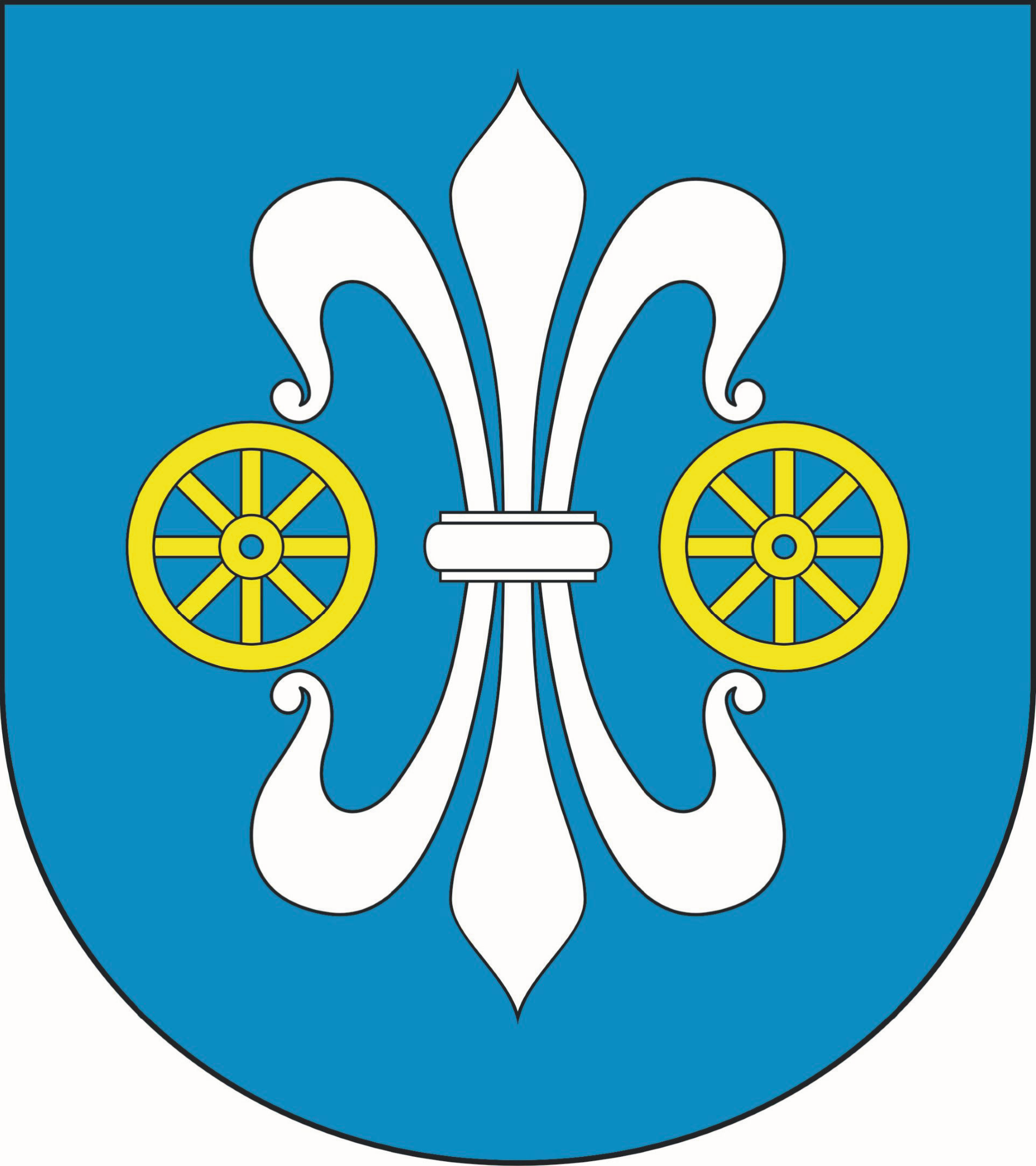 Herb gminy Wierzchlas